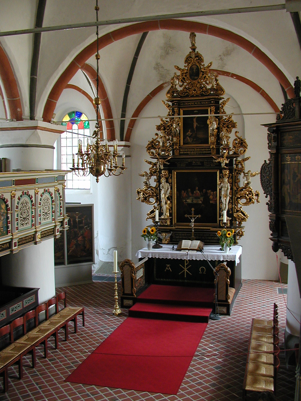 noch ein Blick auf den Barockaltar